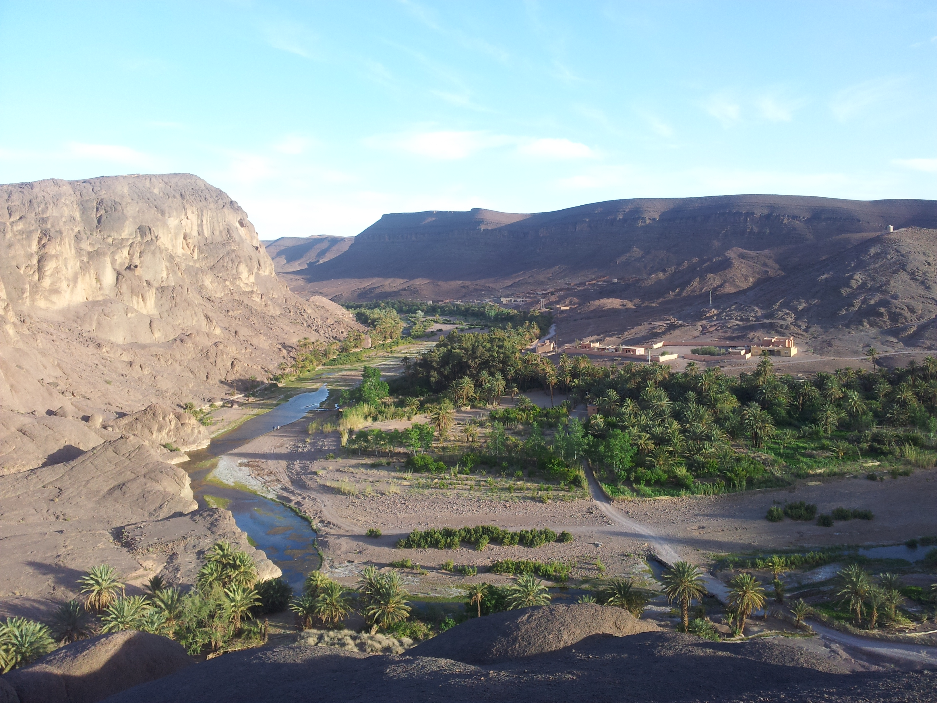 Oasis de fint à Ouarzazate